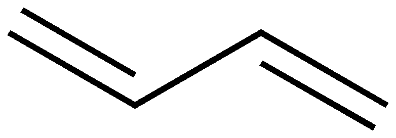 丁二烯